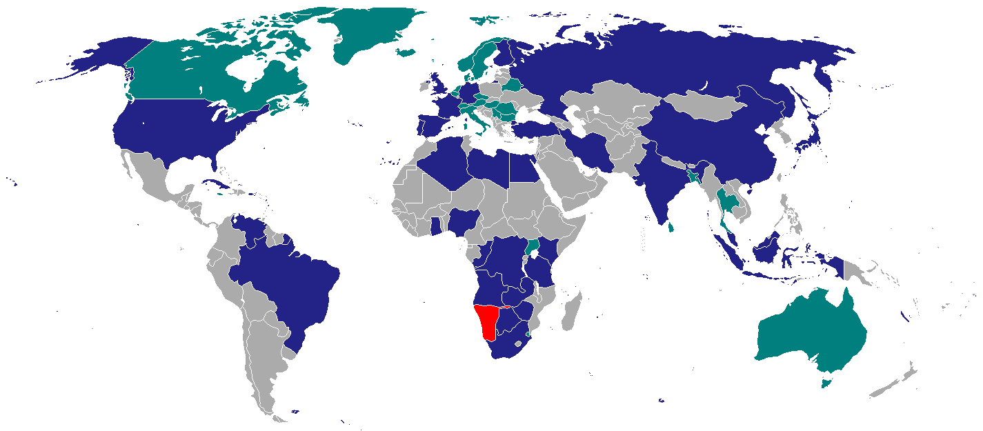 Namibische AuslandsvertretungenRot = NamibiaDunkelblau = Botschaften/HochkommissariateHellblau = nur Konsulate